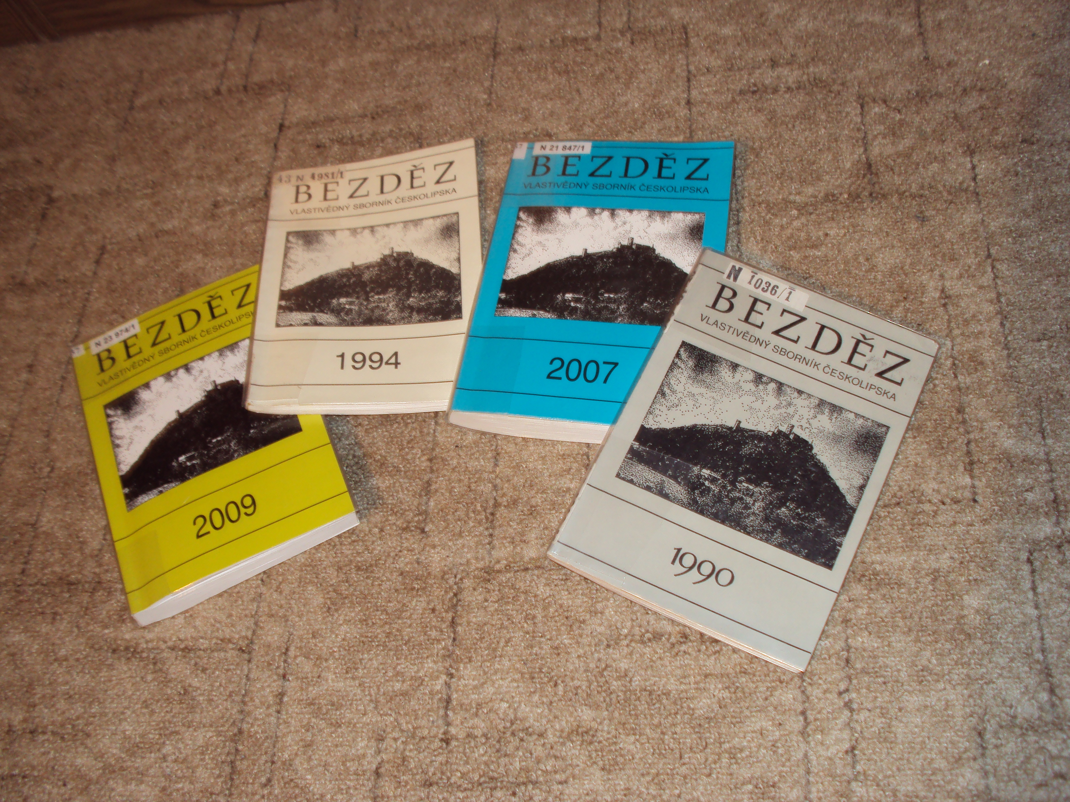 Ukázky titulních stran sborníků Bezděz